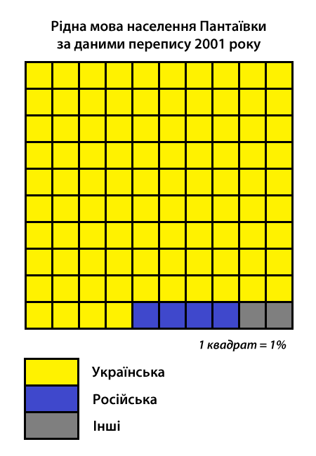 Інфографіка розподілу населення смт Пантаївка Олександрійської міськради за рідною мовою згідно з даними перепису 2001 року. Джерело: Розподіл населення Кіровоградської області за рідною мовою (у % до загальної чисельності населення) за переписом 2001 року